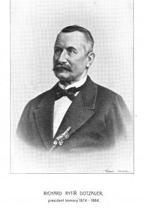 Richard Jakub rytíř Dotzauer